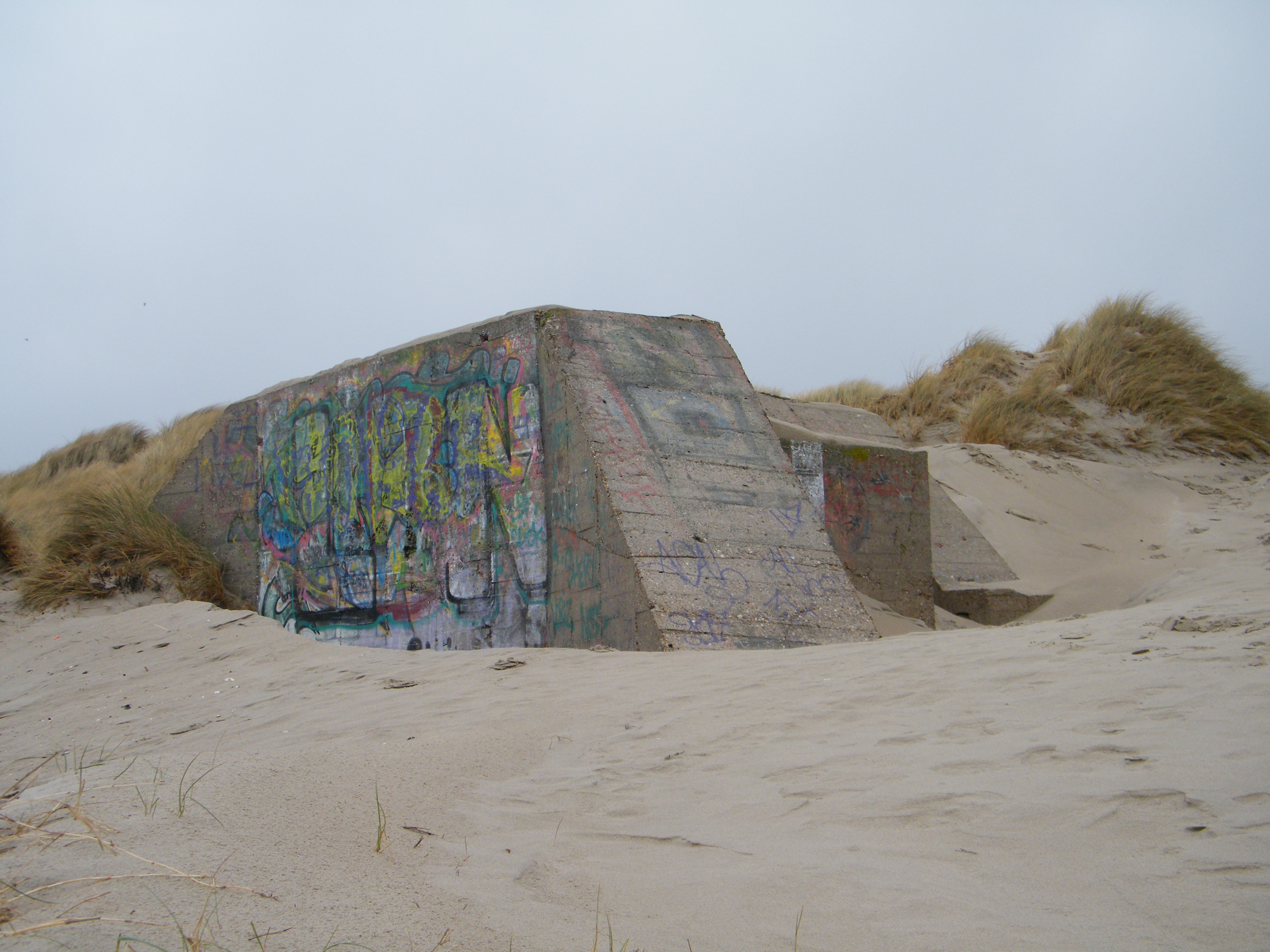 Stella-Plage, Pas-de-Calais, Fr, mur de l'Atlantique.